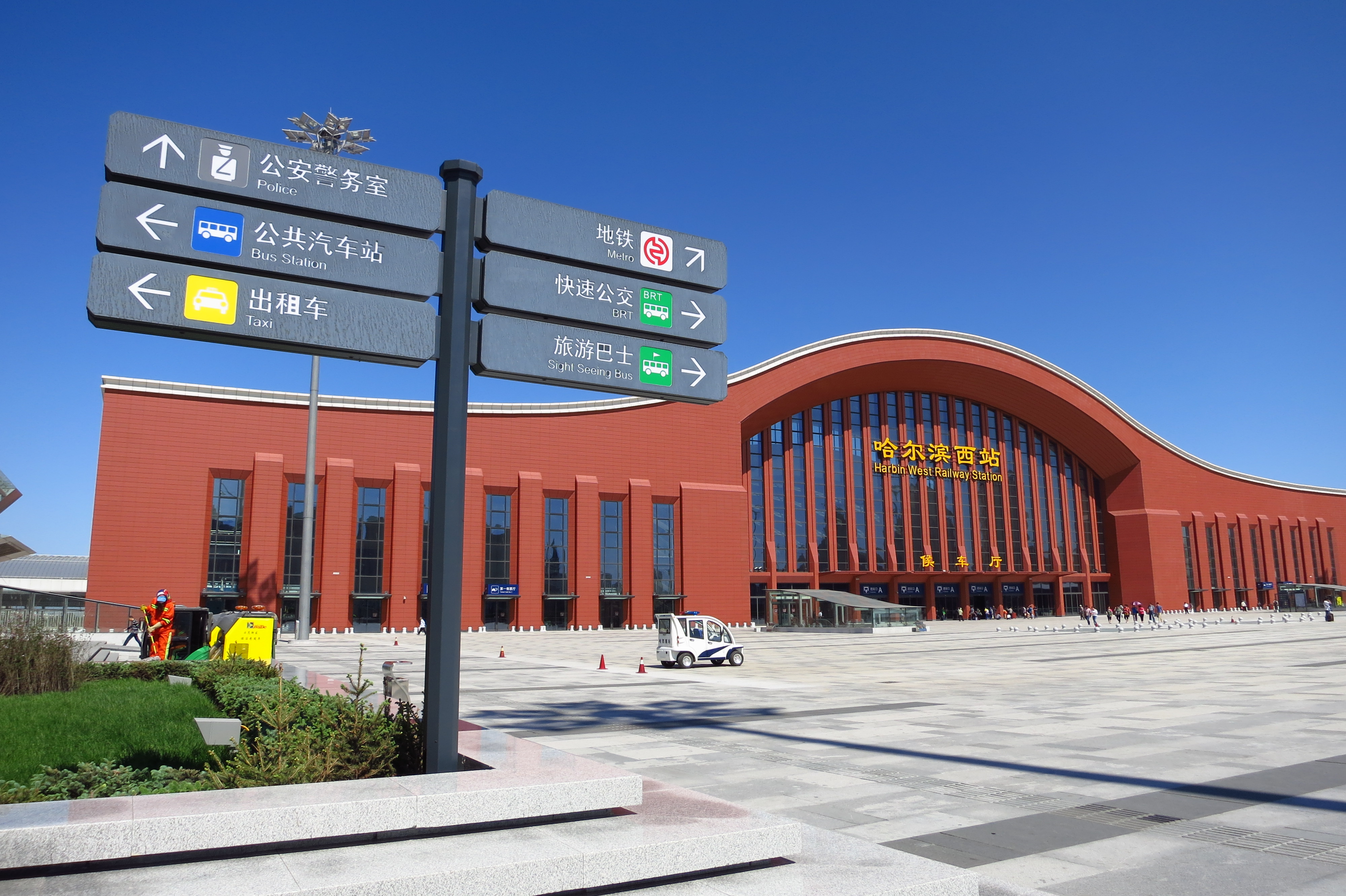 黑龙江省哈尔滨西站